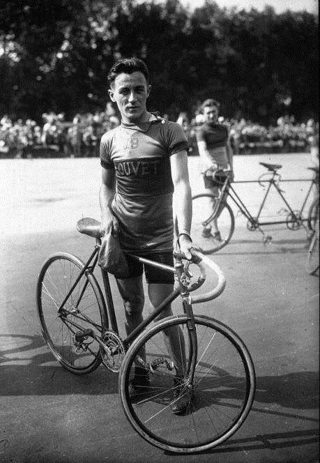 Longchamp , 7ème Criterium des As : Marcillac : [photographie de presse] / Agence Meurisse